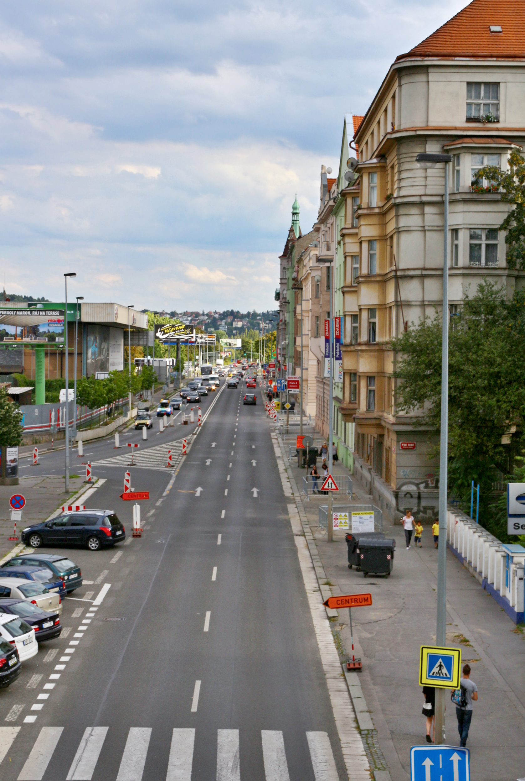 Smíchov Strakonická ulice